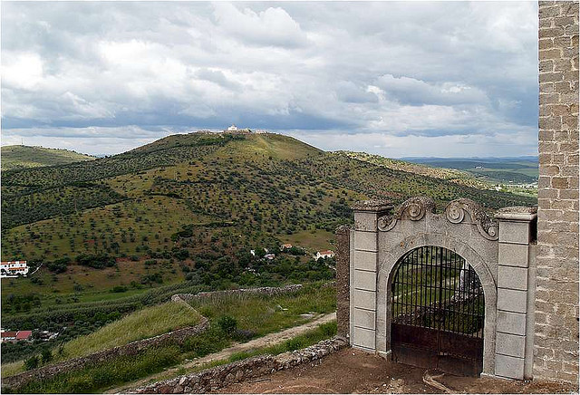 Vista norte e portão junto ao castelo de Elvas